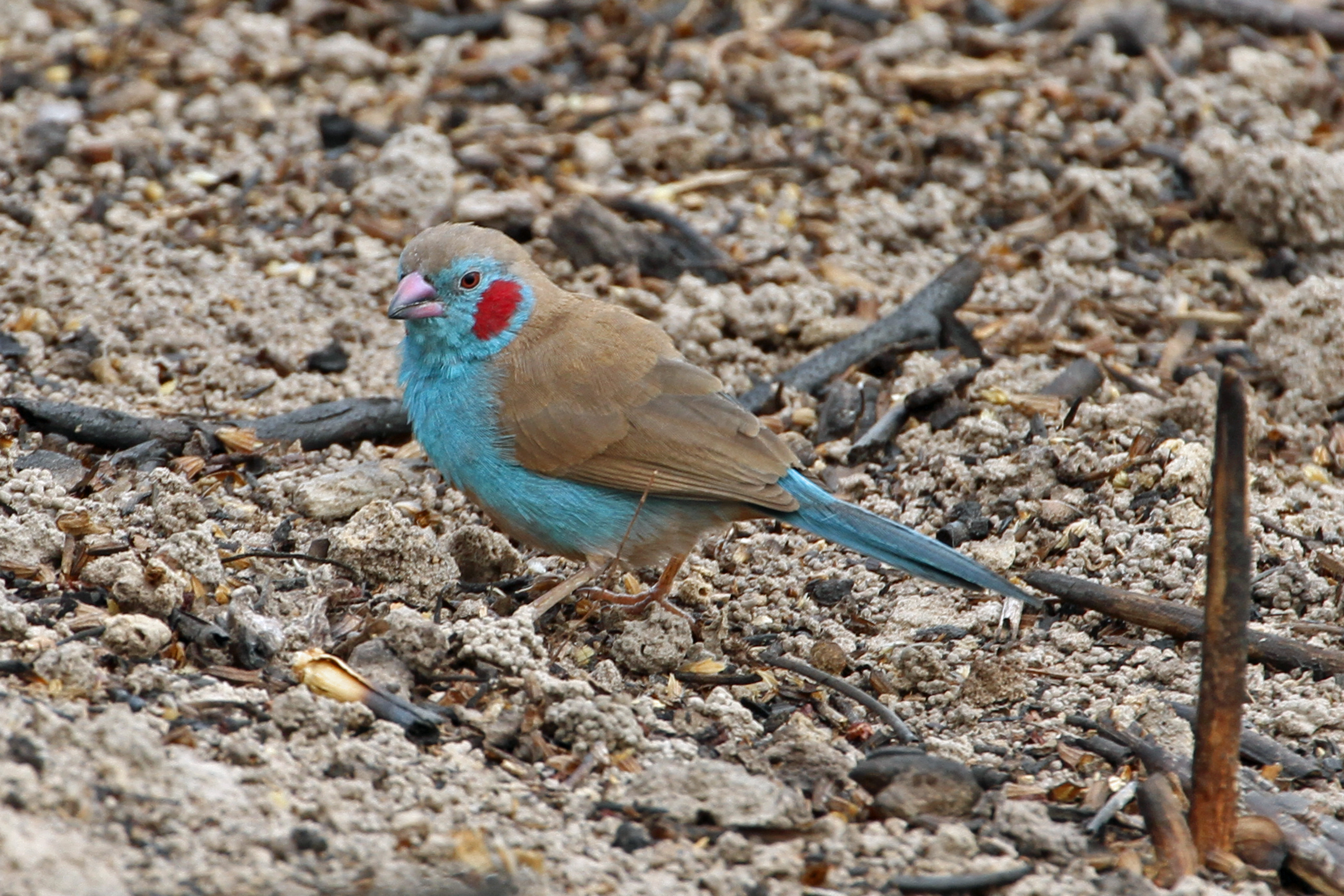 Gambia, Brufut